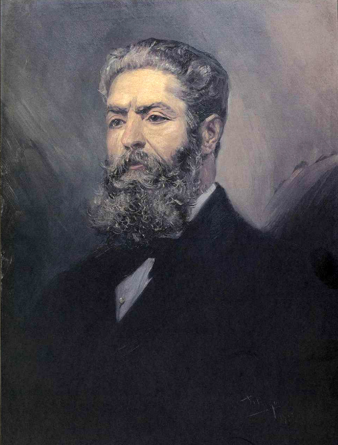 Retrato de Joaquín Costa.